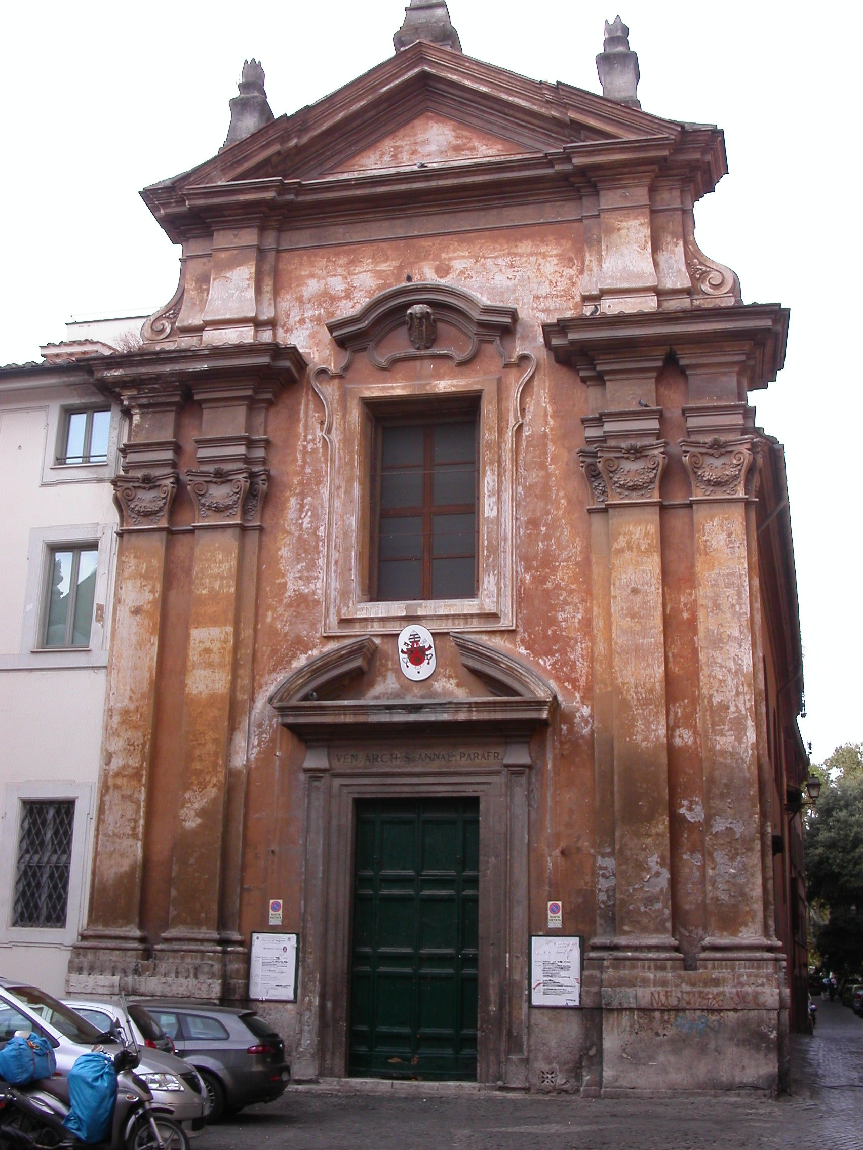 Church of Santa Catarina della Rota, Piazza Santa Catarina della Rota, Rome